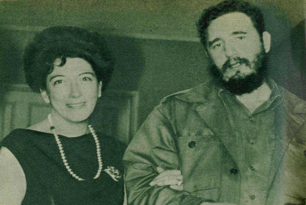 Inés Enríquez, política chilena, y Fidel Castro.